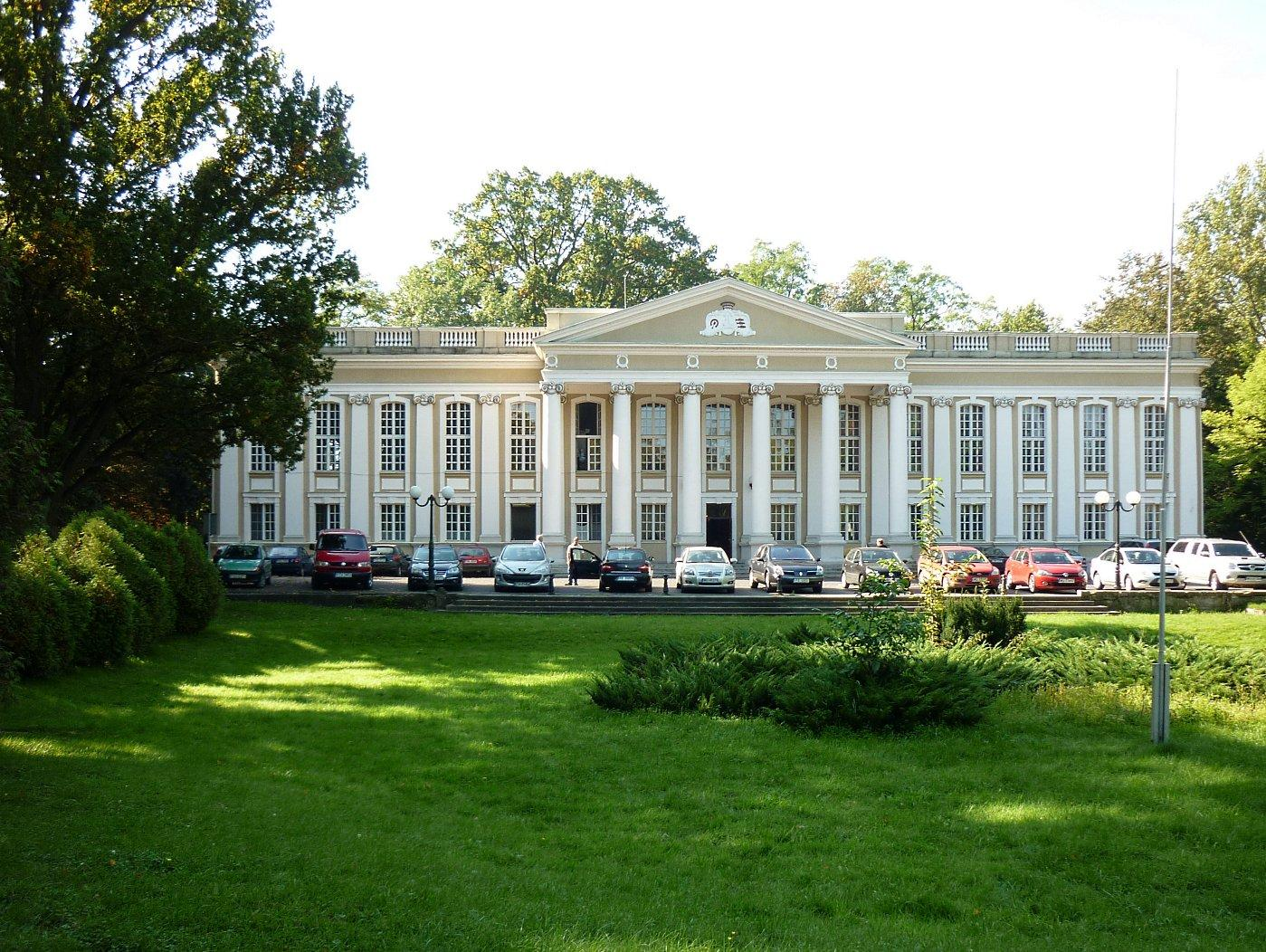 Pałac Apolinarego Gajewskiego w Wolsztyńaskim parku.